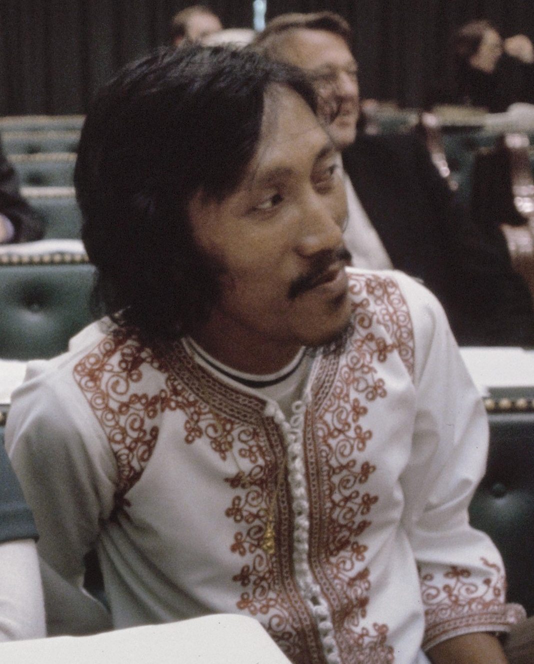 Koninkrijksdebat in Tweede Kamer met Surinaamse Statenleden; Somohardjo (rechts) en Liesdek Clarke (links)